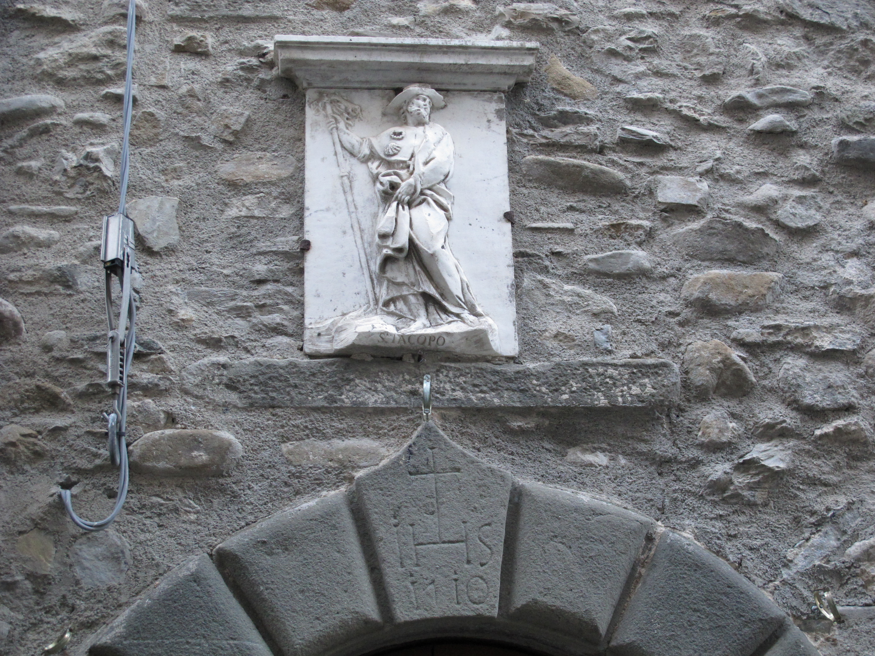 Filattiera, ospedale di san jacopo d'altopascio 2